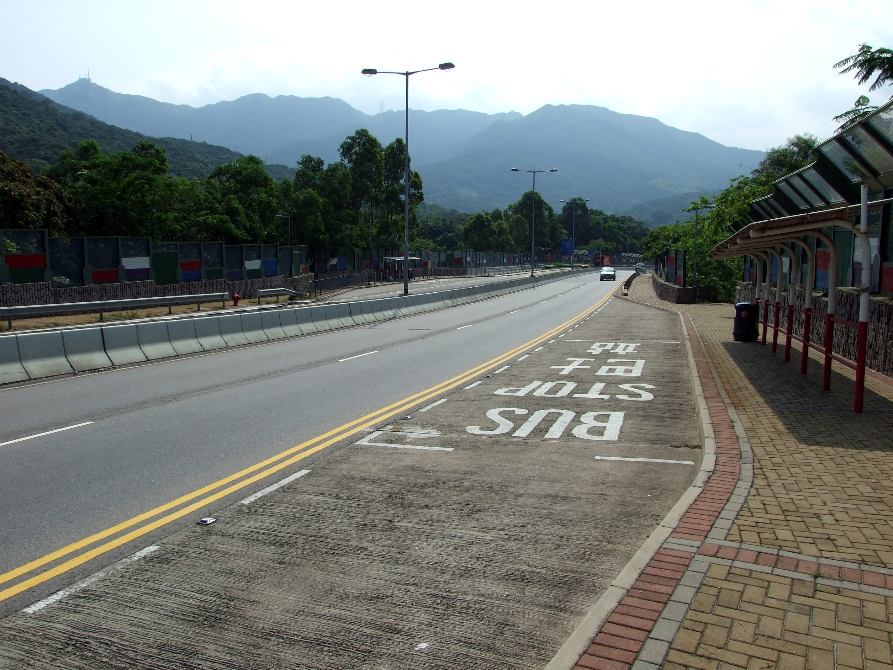 中文（香港）: 新西貢公路近窩美一段